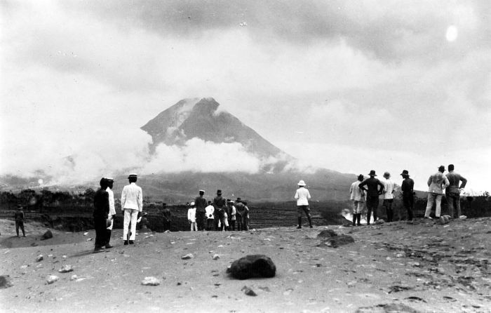 Repronegatief. Een gezelschap neemt een kijkje naar de verwoestingen, aangericht door de uitbarsting van de Merapi